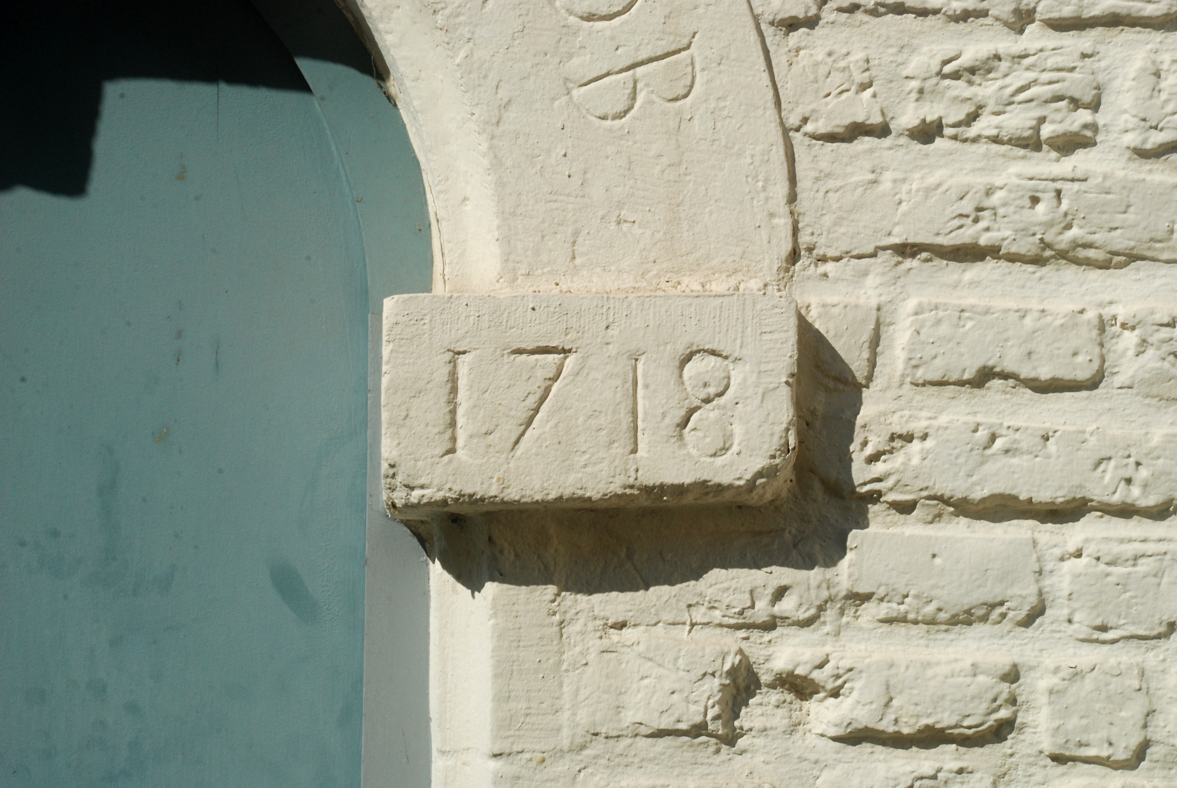 België - Leuven - Klein Begijnhof - Huis Sint-Job (n° 25)